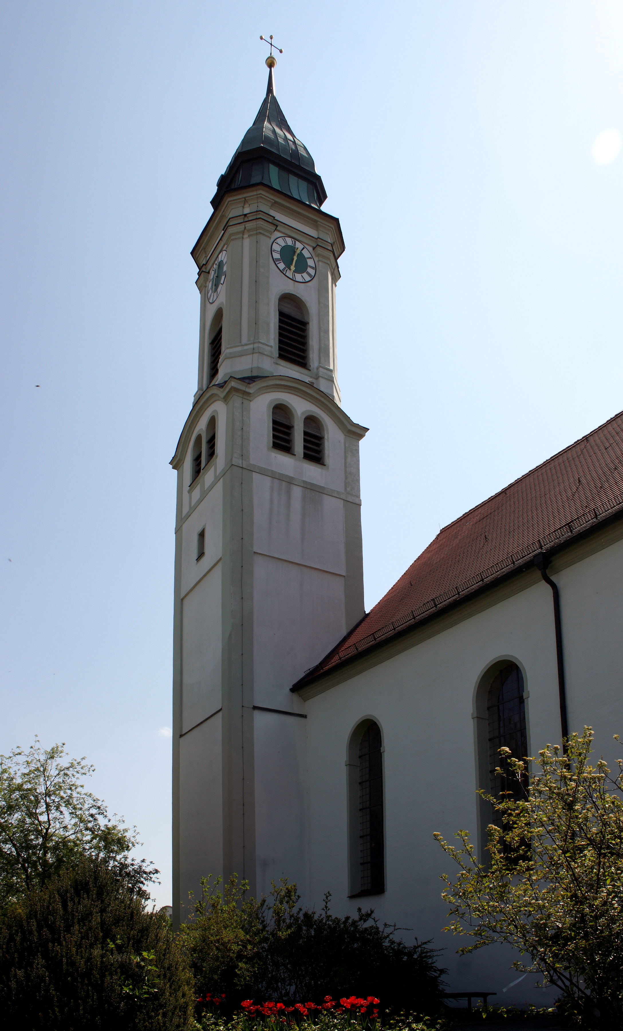 Katholische Pfarrkirche St. Georg in Westendorf, einer Gemeinde im Landkreis Augsburg (Bayern)